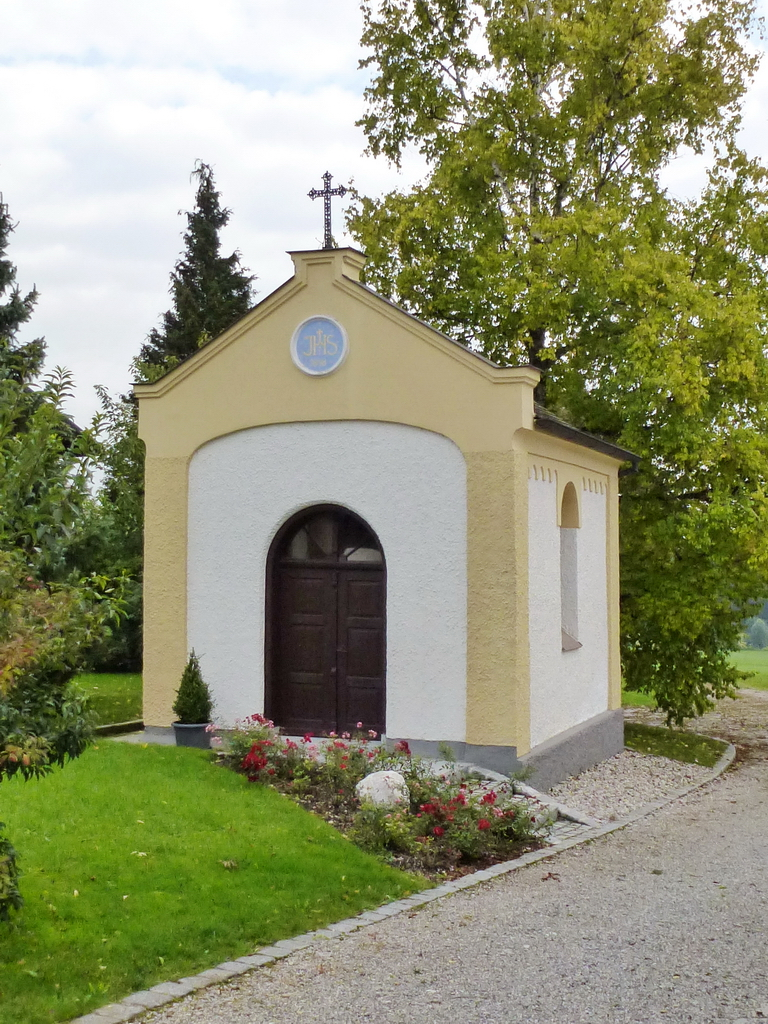 Hofkapelle neben dem RemisengebäudeThis is a photograph of an architectural monument.